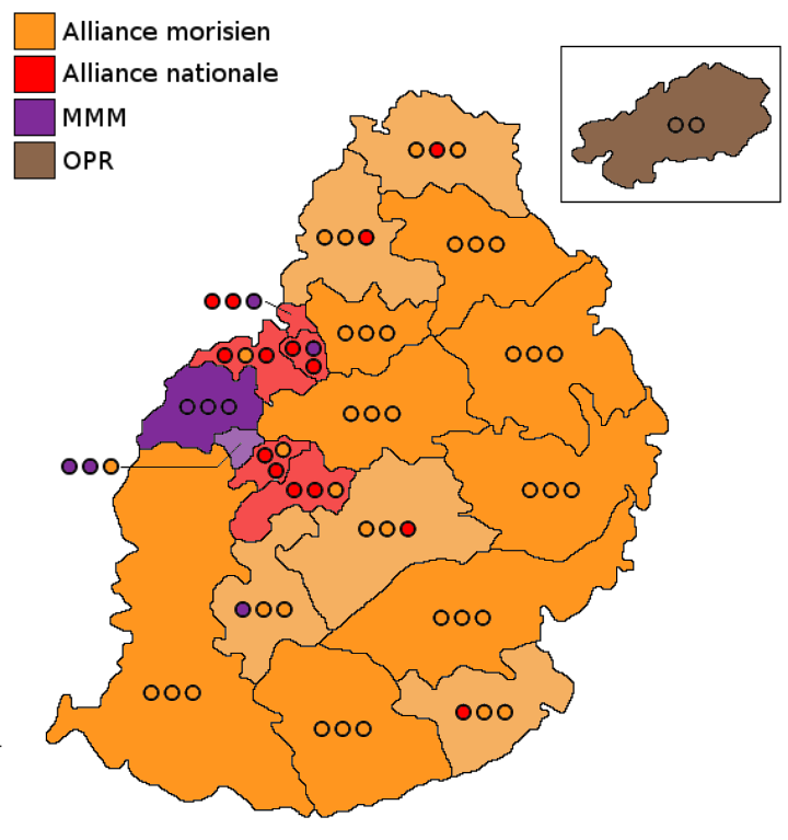 Carte représentant les sièges obtenus par parti et par circonscription aux élections législatives de 2019 à Maurice